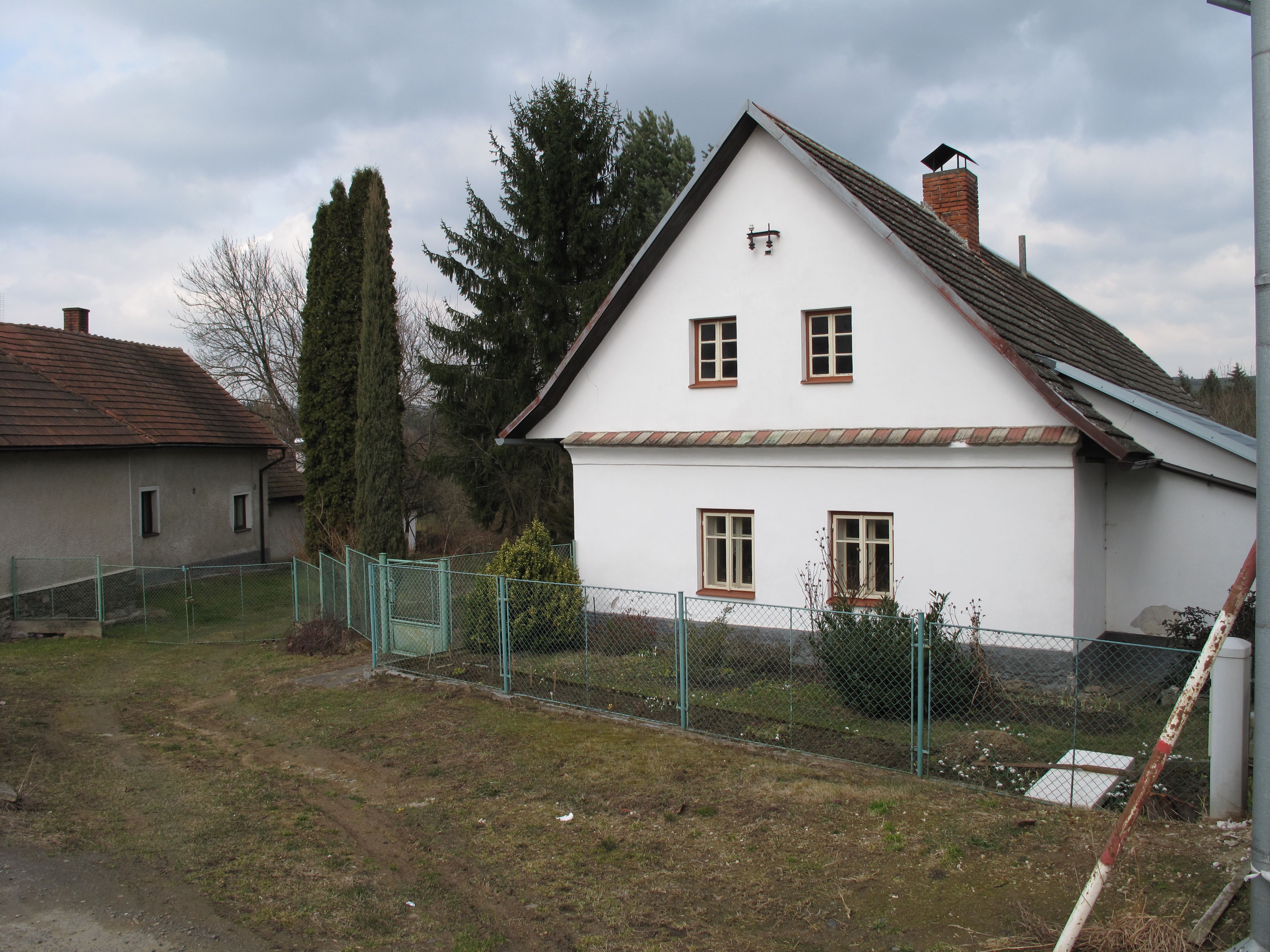 Dům v Sechově. Okres Havlíčkův Brod, Česká republika.